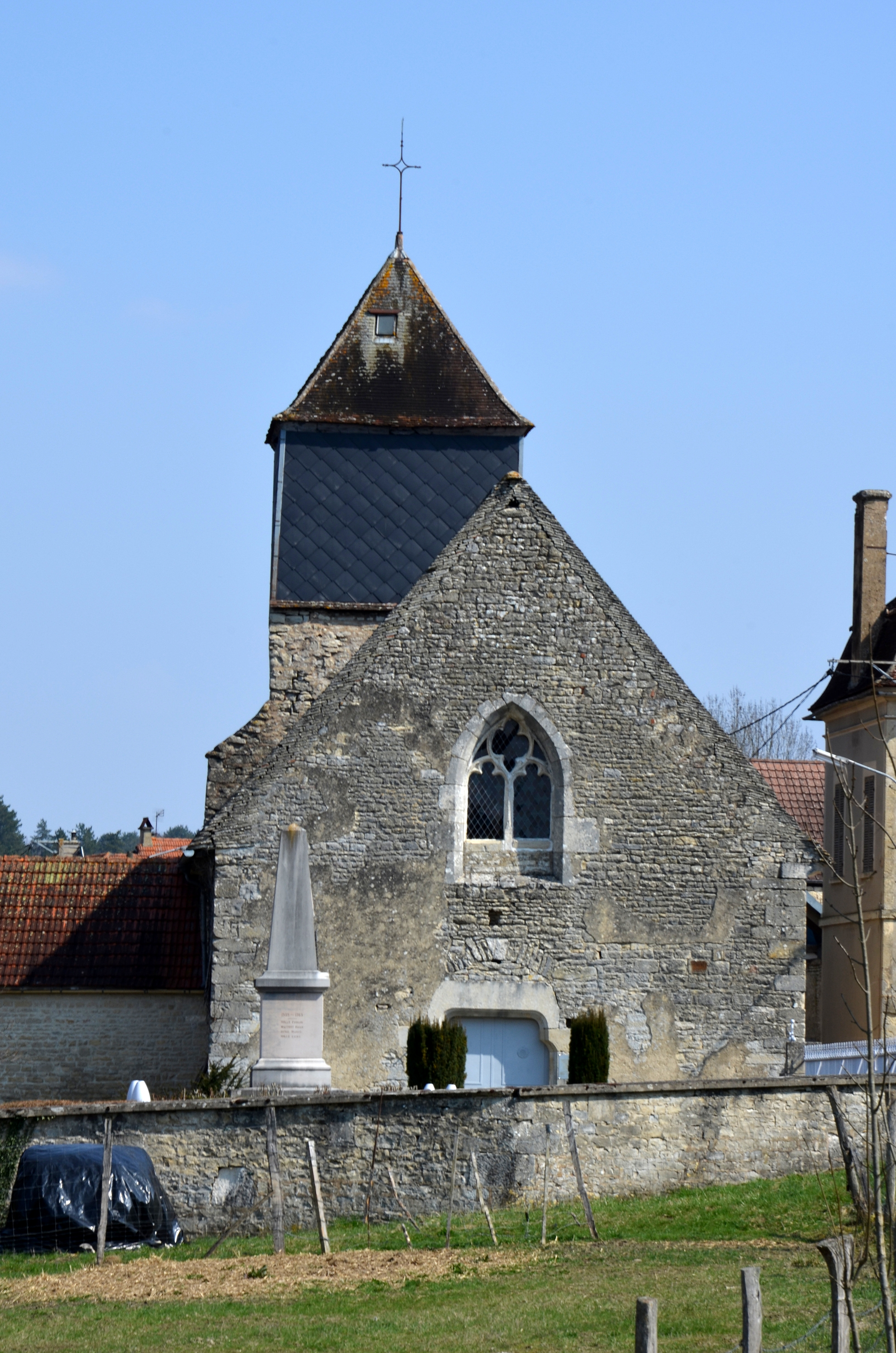 Eglise d'Ancy le Libre, Yonne, Bourgogne, France